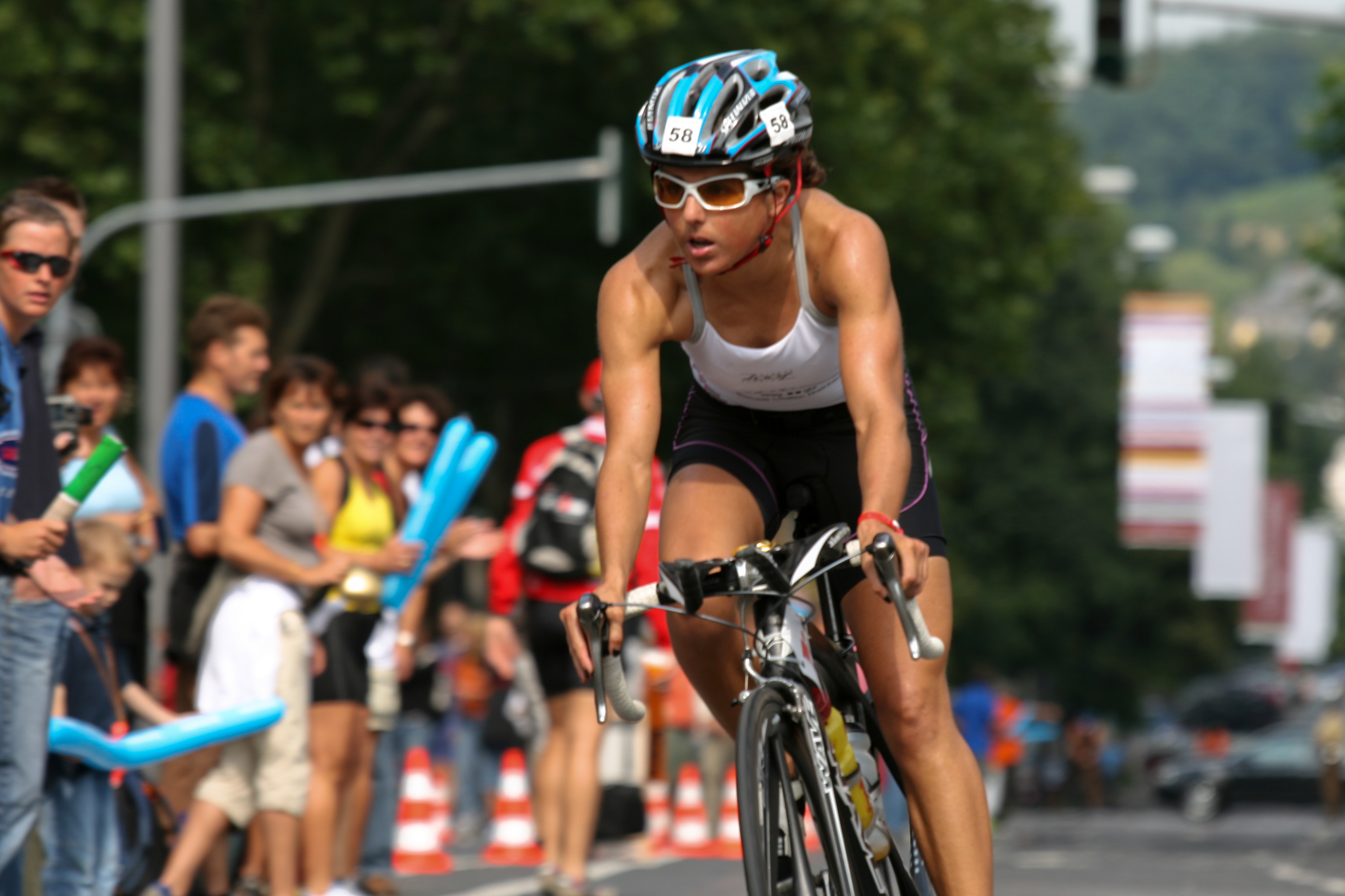 Virginia Berasategui 2007